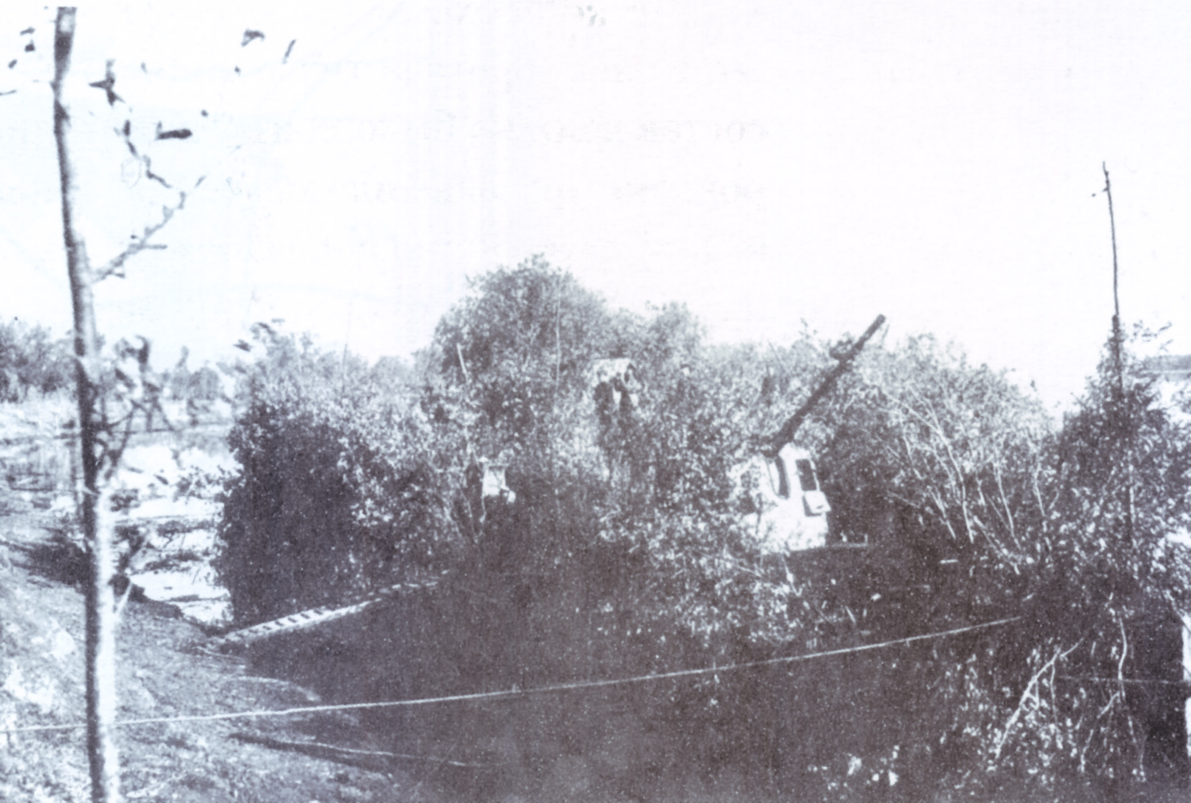 Канонерская лодка "Федосеенко", находящаяся на огневой позиции во время Сталинградской битвы. Фотография сделана до 1 ноября 1942 года, когда канонерская лодка была выведена для зимовки в Гурьев.